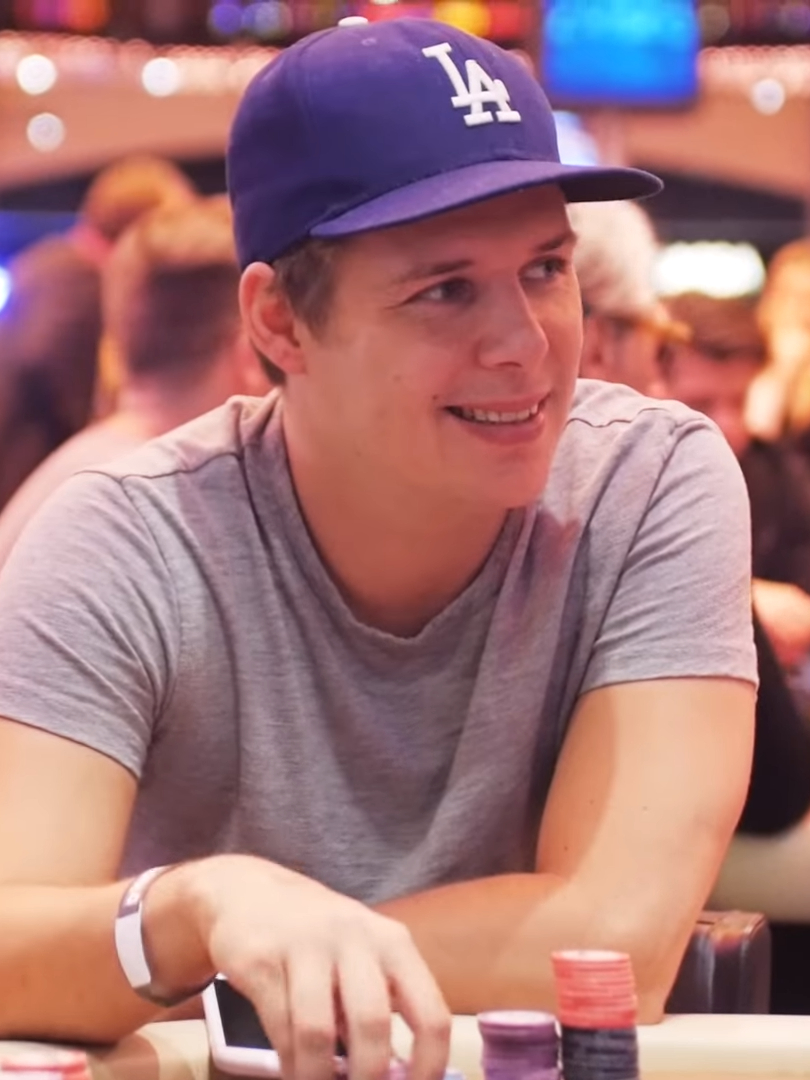 Noah Boeken beim WPTDeepStacks Amsterdam